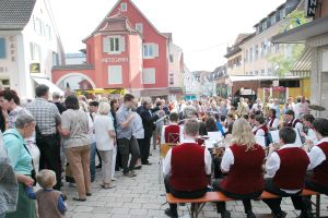 Immer am letzten Wochenende im Juni findet seit 1971 das Müllheimer Stadtfest in der Wilhelmstraße (Fußgängerzone) sowie den angrenzenden Gassen und Höfen statt.